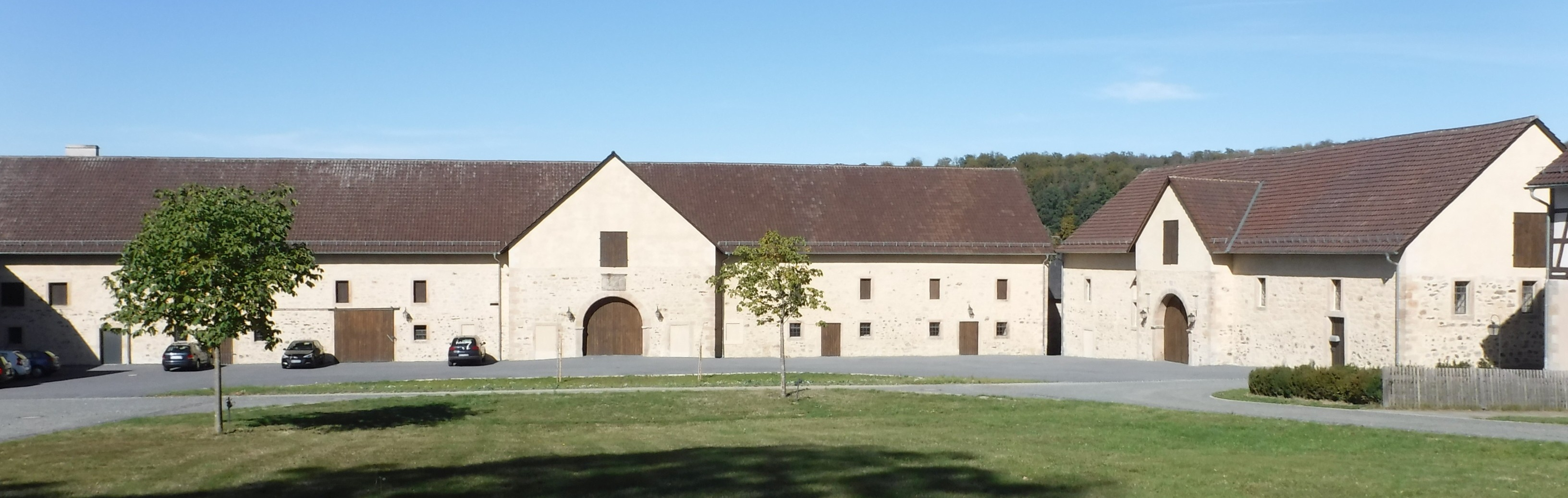 Schloss und Gut Großropperhausen, das größte Barockgut Hessens